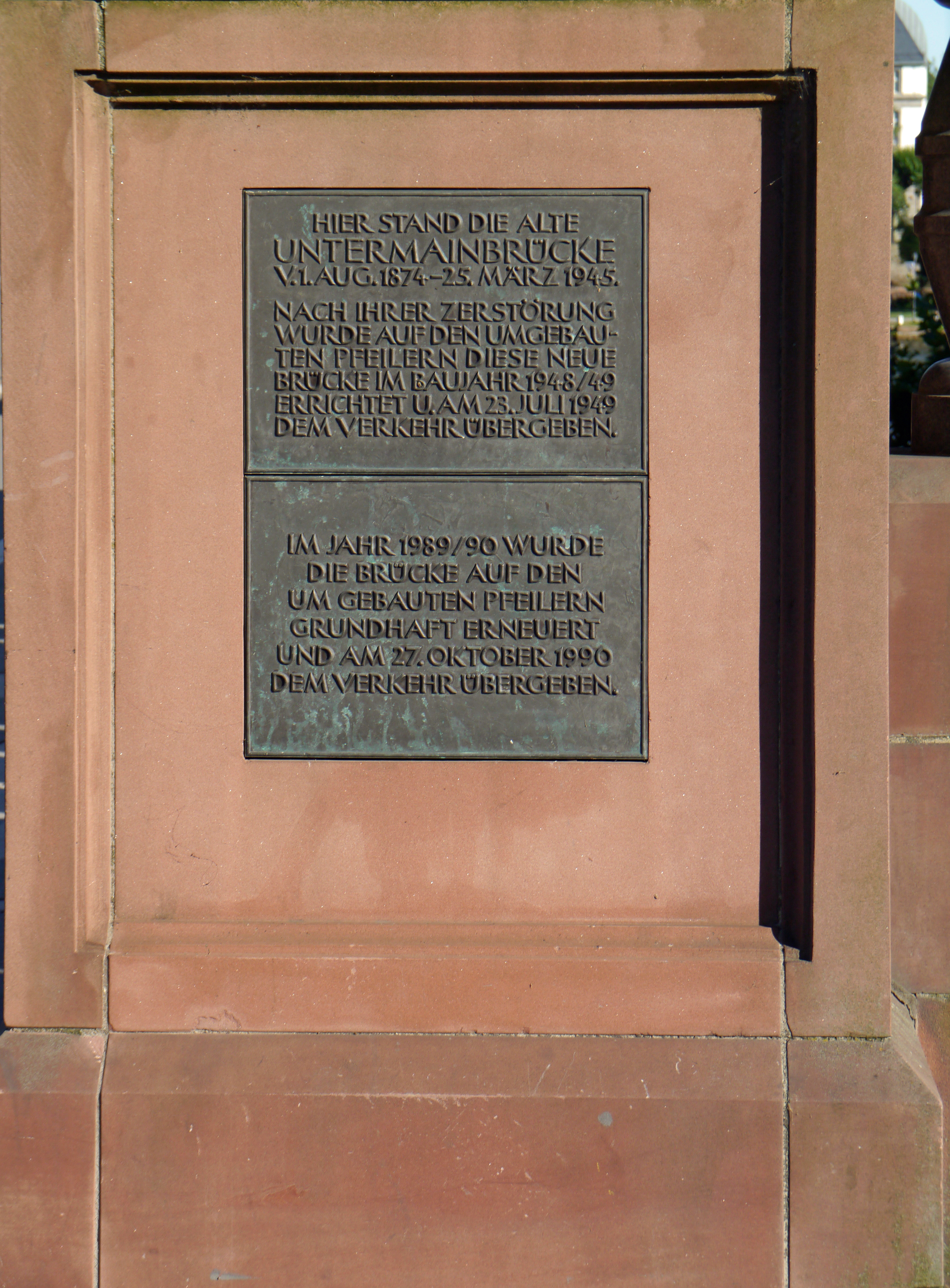 Gedenkplakette am nord-westlichen Brückenkopf der Untermainbrücke in Frankfurt am Main.